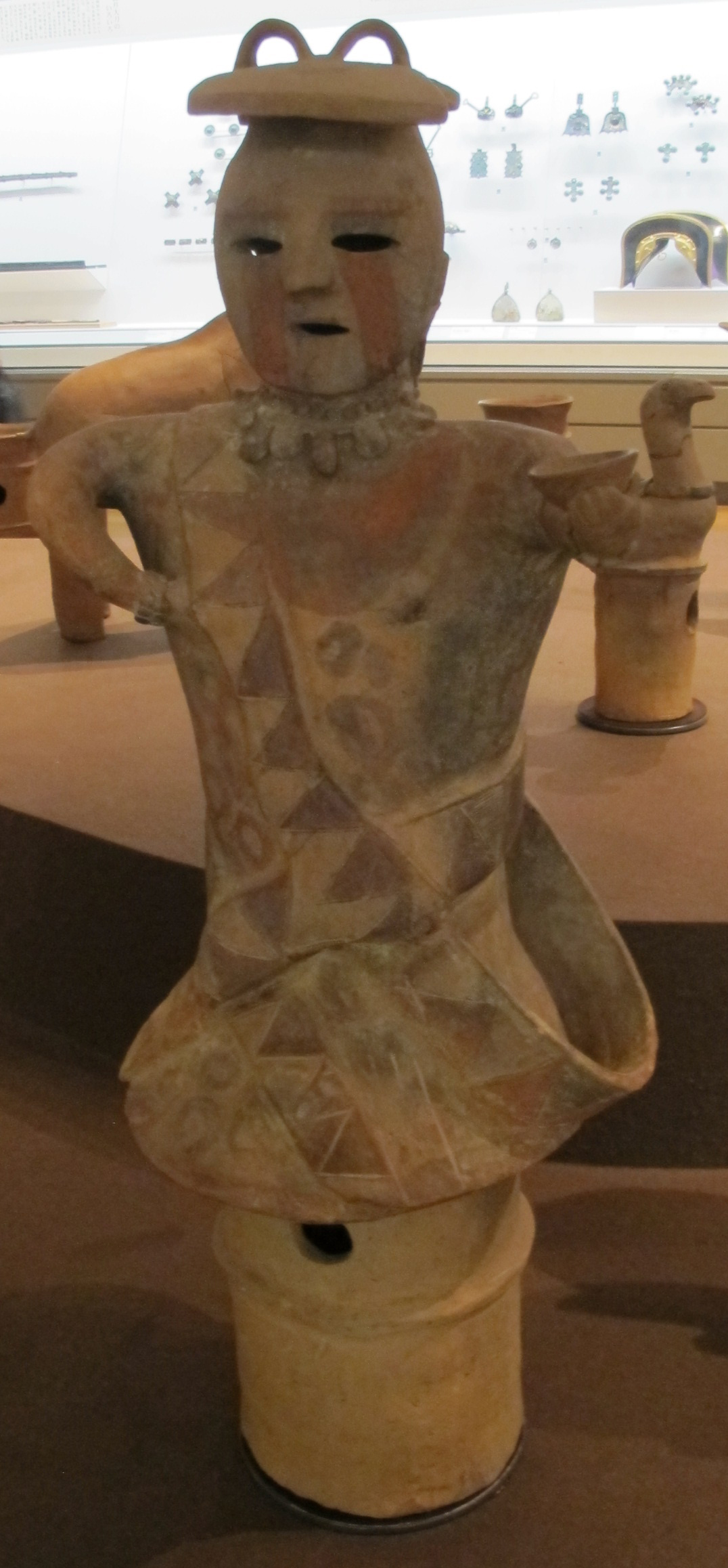 Periodo kofun, haniwa, donna, VI sec